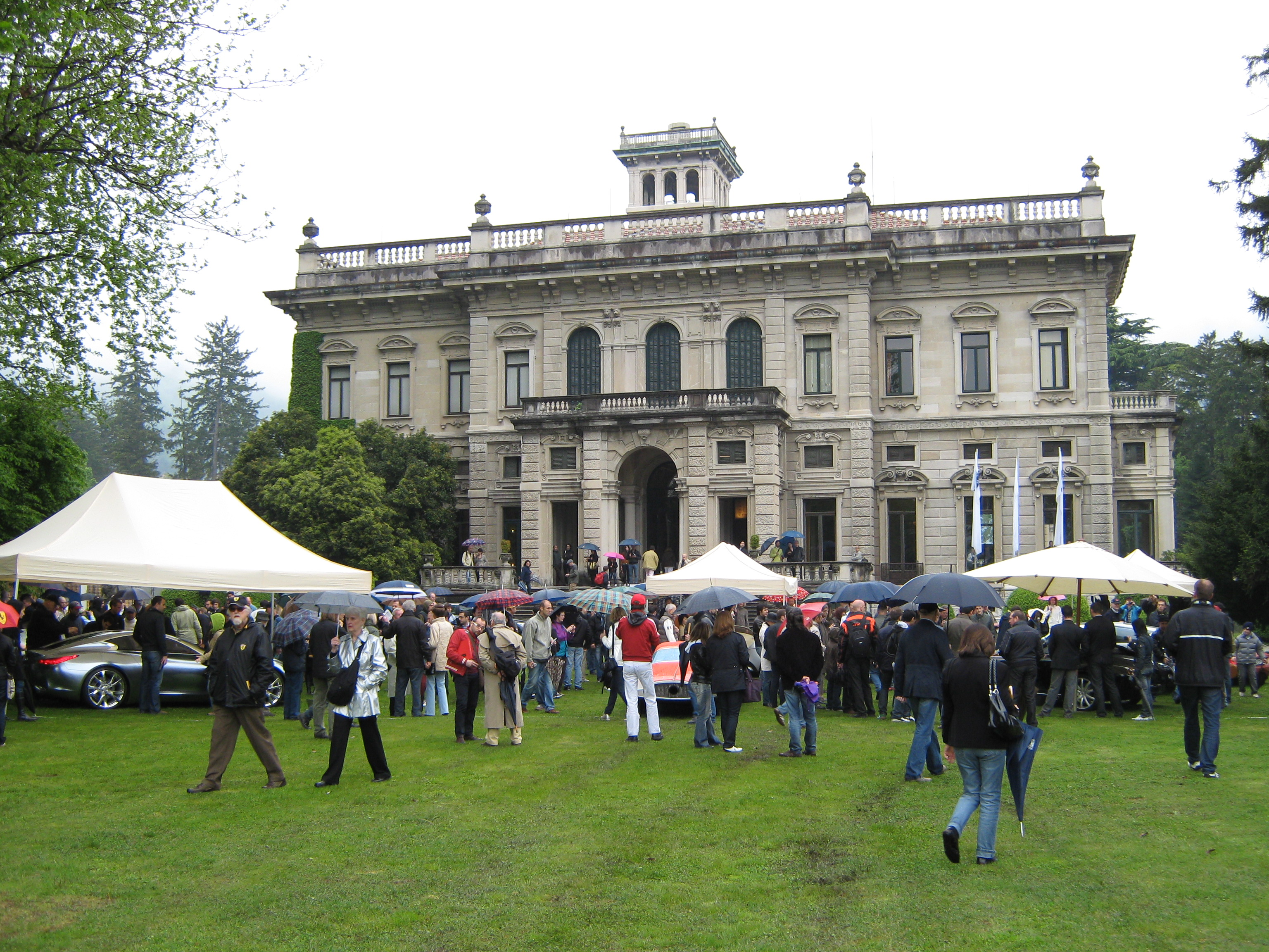 Veduta di Villa d'Erba a Cernobbio durante lo svolgimento del concorso di eleganza "Villa d'Este" (2009).